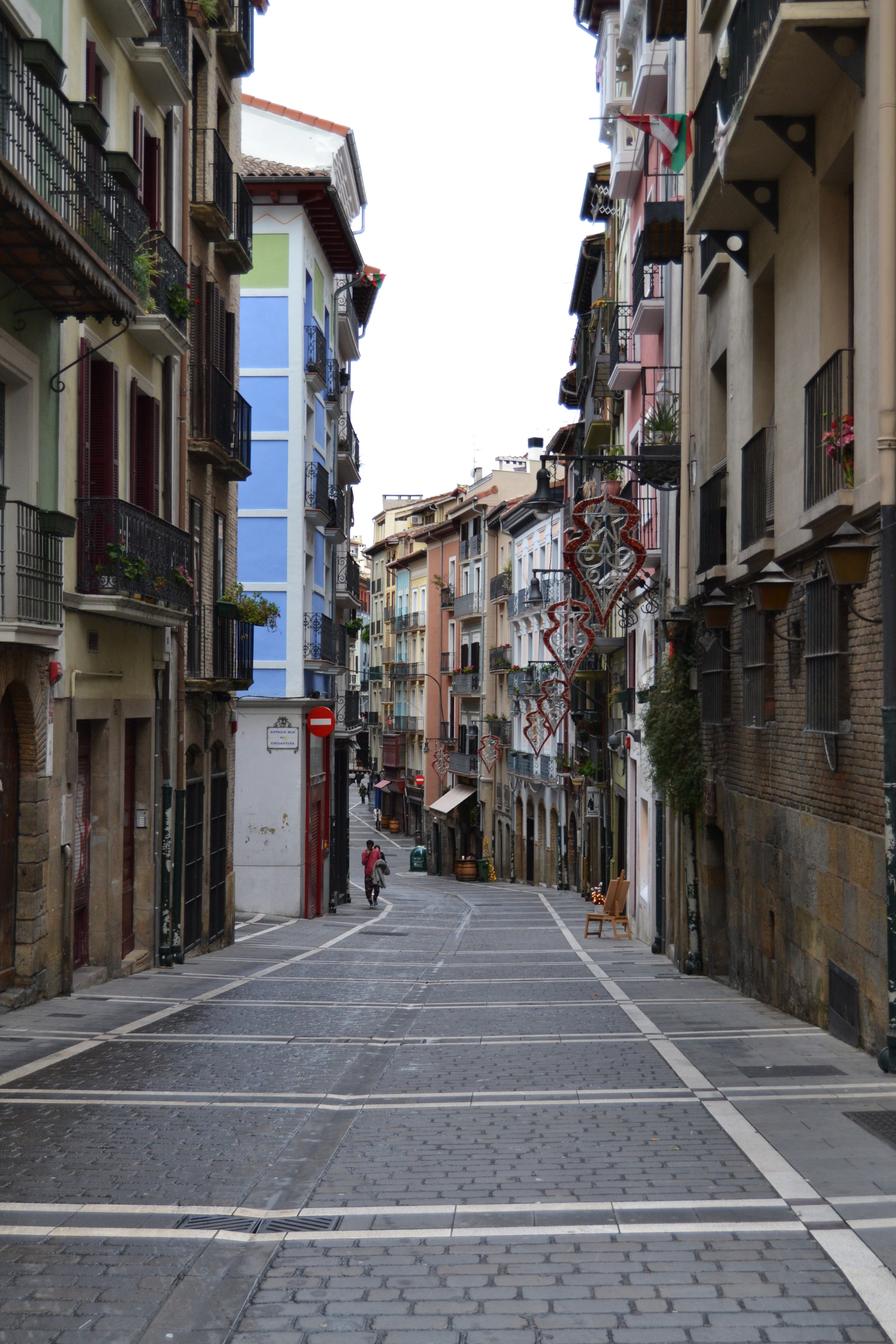 Kuria Kalea.